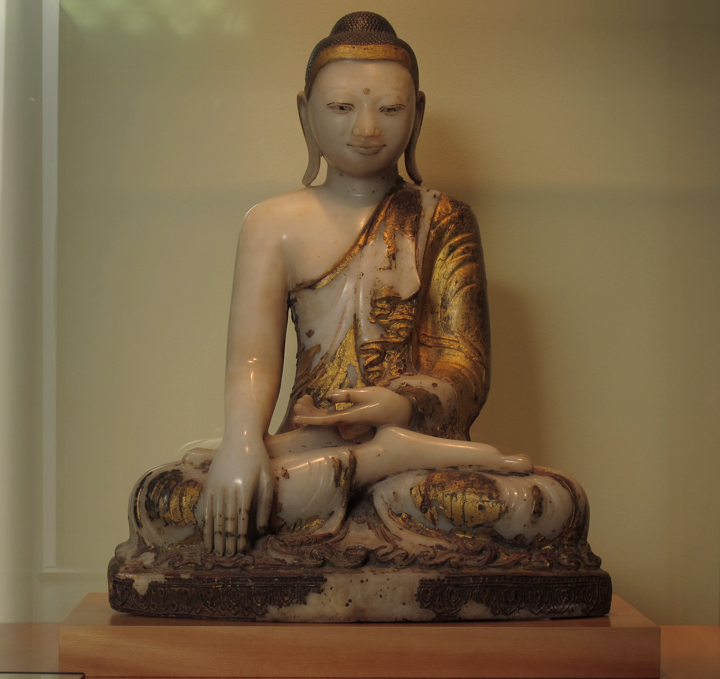 Buddha vainqueur des assauts de Mara, Maravijaya. Le Buddha assis en position de « prise de la terre à témoin ». Albâtre et laque polychrome, traces de dorure... Birmanie, XIXe siècle. Musée Georges Labit Cette position symbolise l'Illumination et fait référence à la dernière tentation de Buddha par les trois filles de Mara, démon personnifiant les passions et les objets du désir dans le bouddhisme théravada.